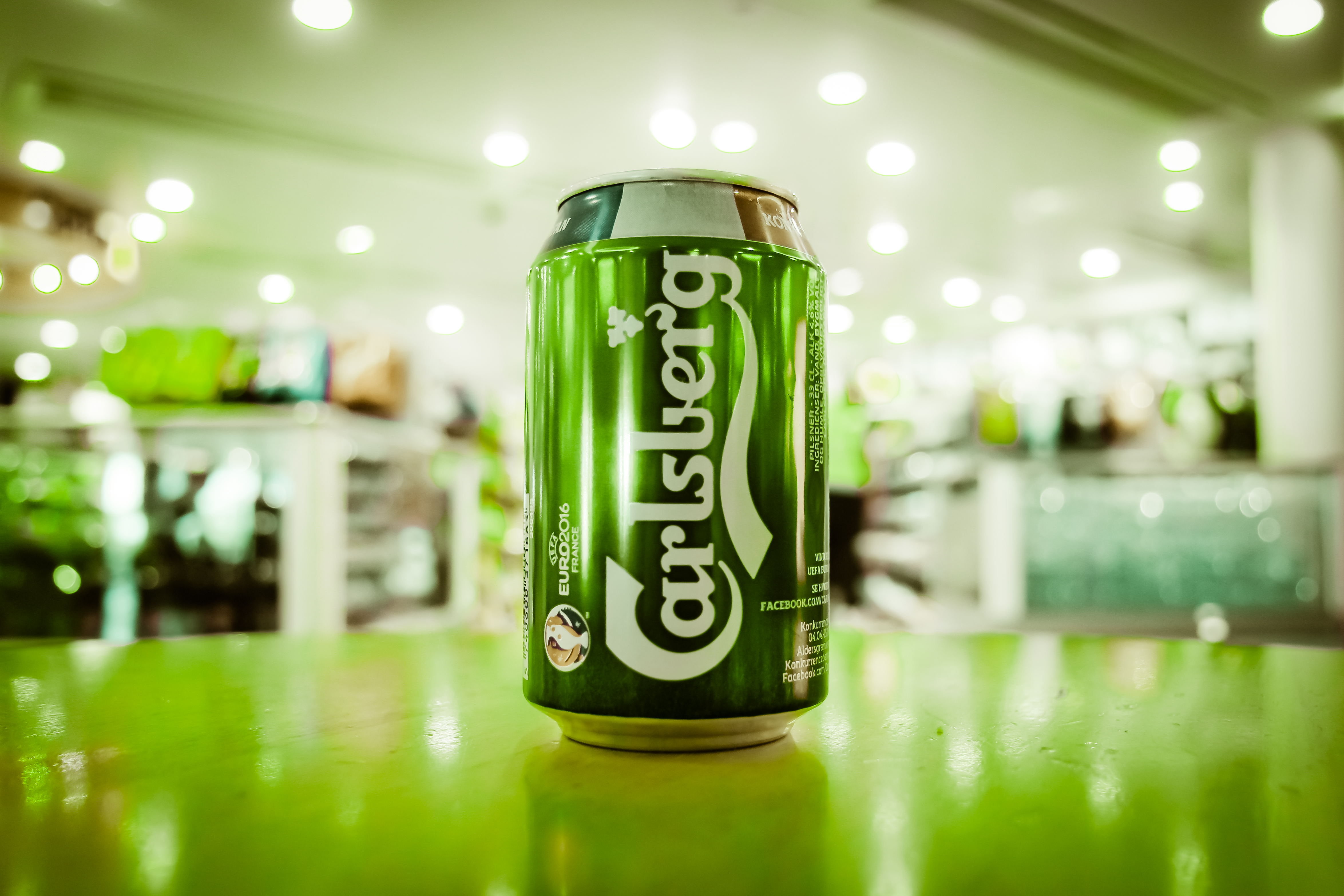 Carlsberg